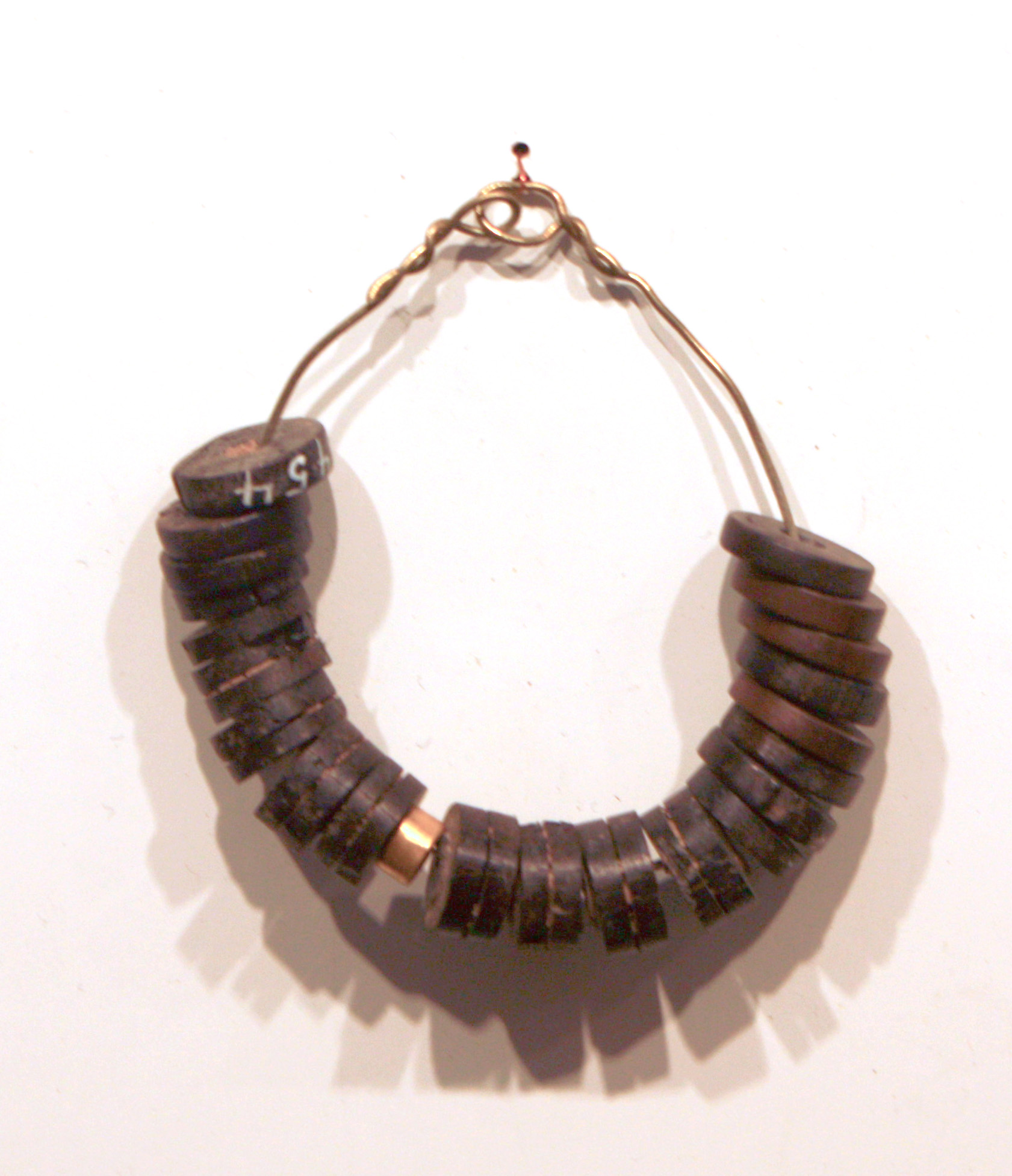 Köln, Halskette aus Gagatplättchen und einem vergoldeten Ring. Fundort: Neusser Straße in Köln. Ort der Ausstellung: Römisch Germanisches Museum in Köln.